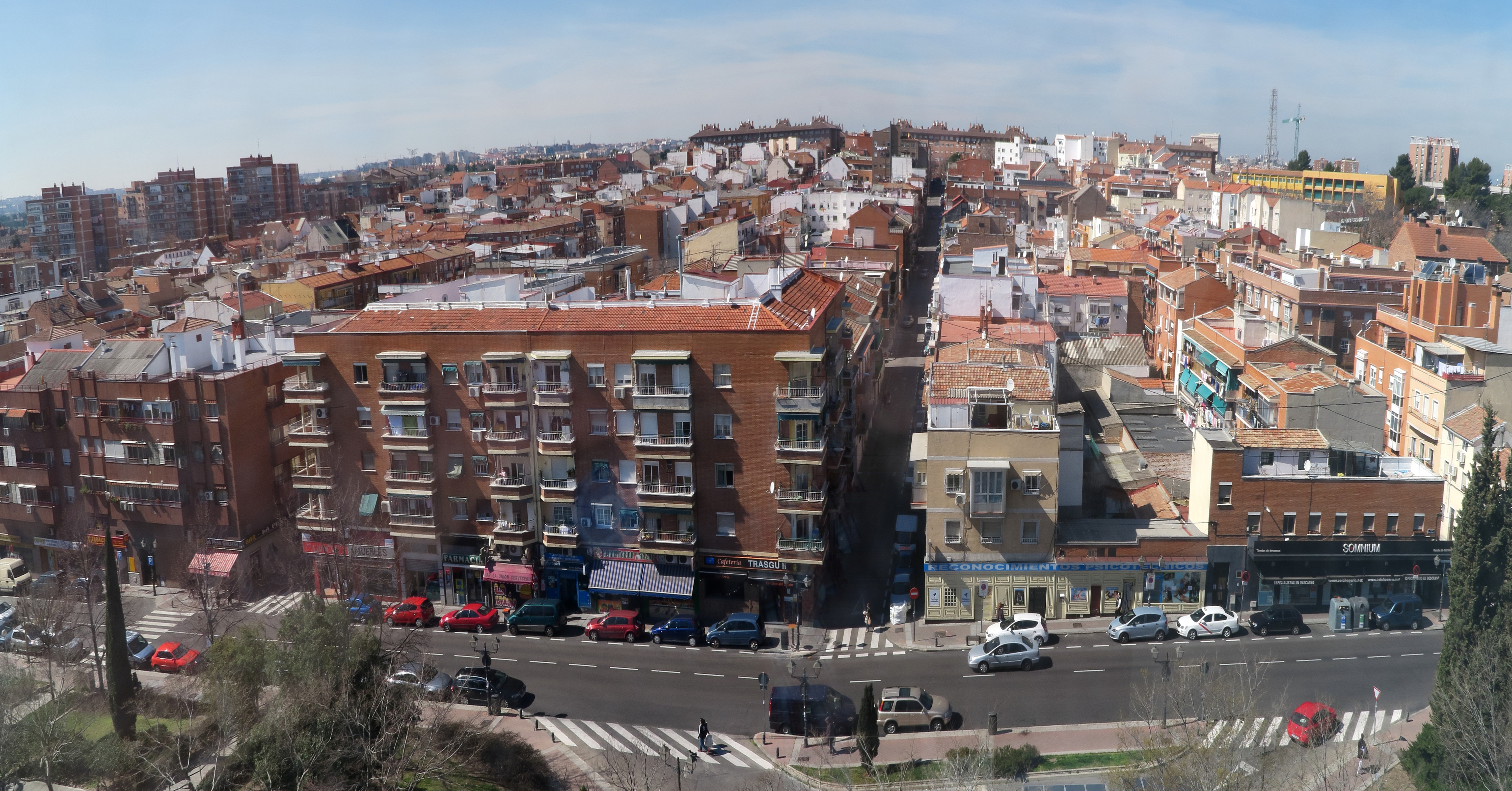 El Zofío